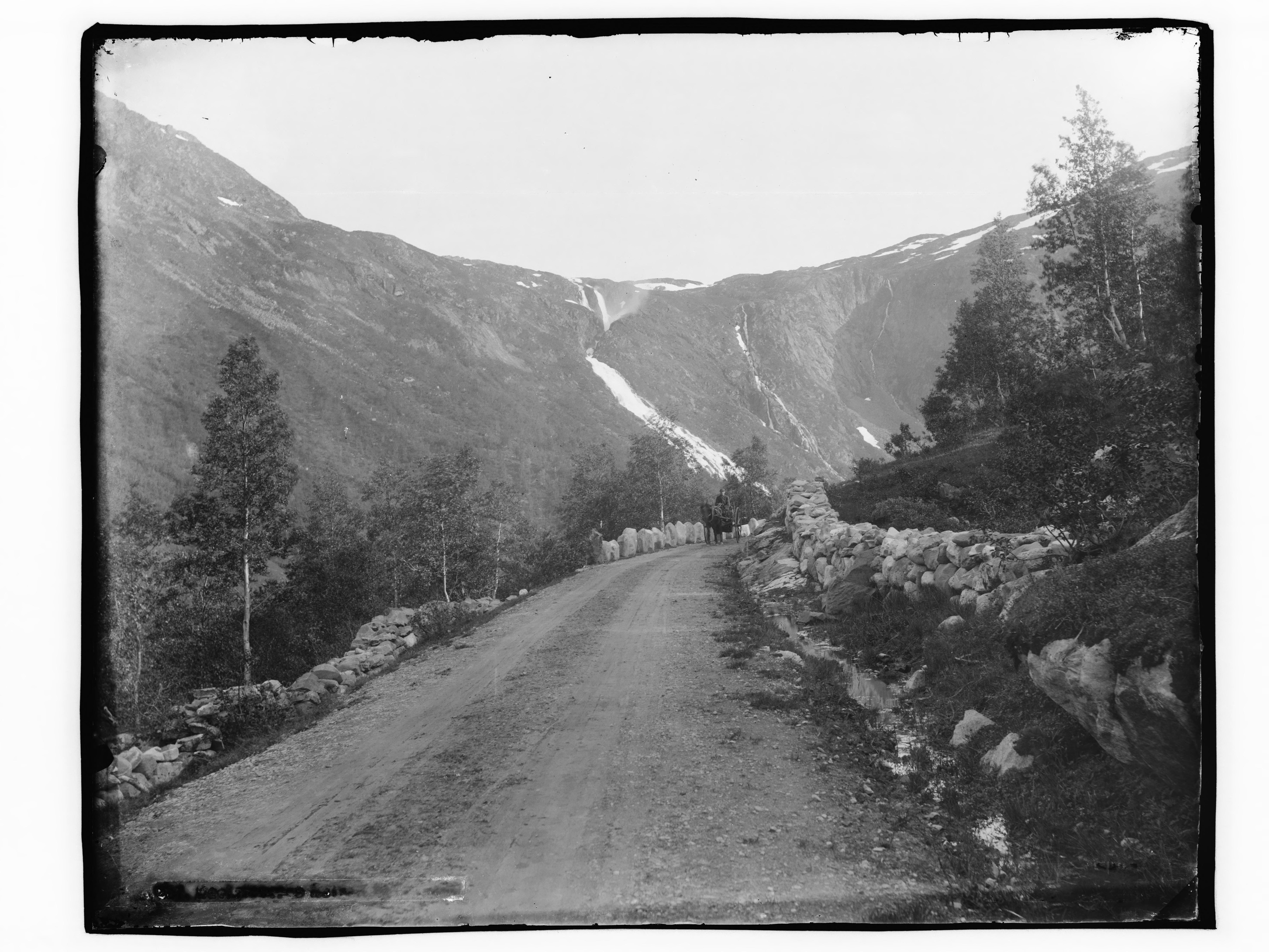 Påskrift negativ: [Uleslig] Påskrift konvolutt: En fjell vei en mann med hest og kjerre. Er med på bilde. [Riksantikvaren] Sted: Novlefoss i Røldal Kommune: Odda Fylke: Hordaland Tagger: landskap kjerrevei hest og kjerre ukjent sted